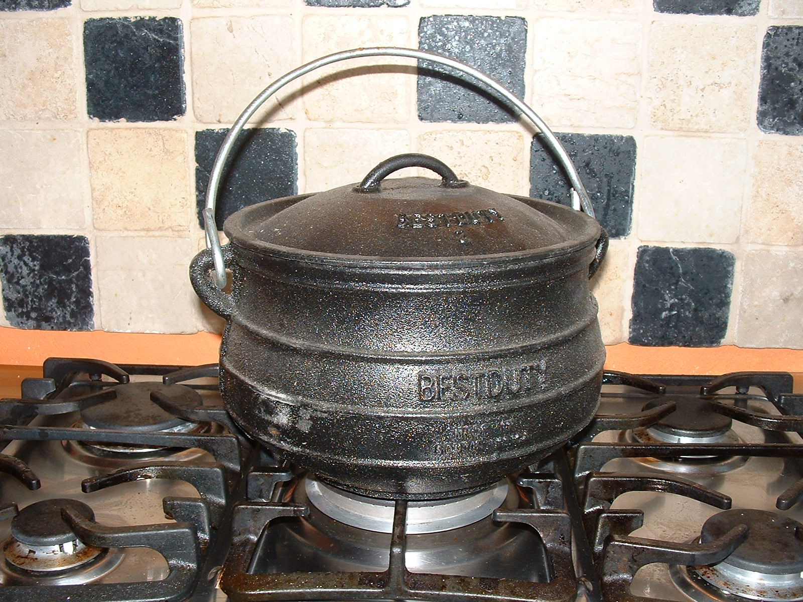 Grapen